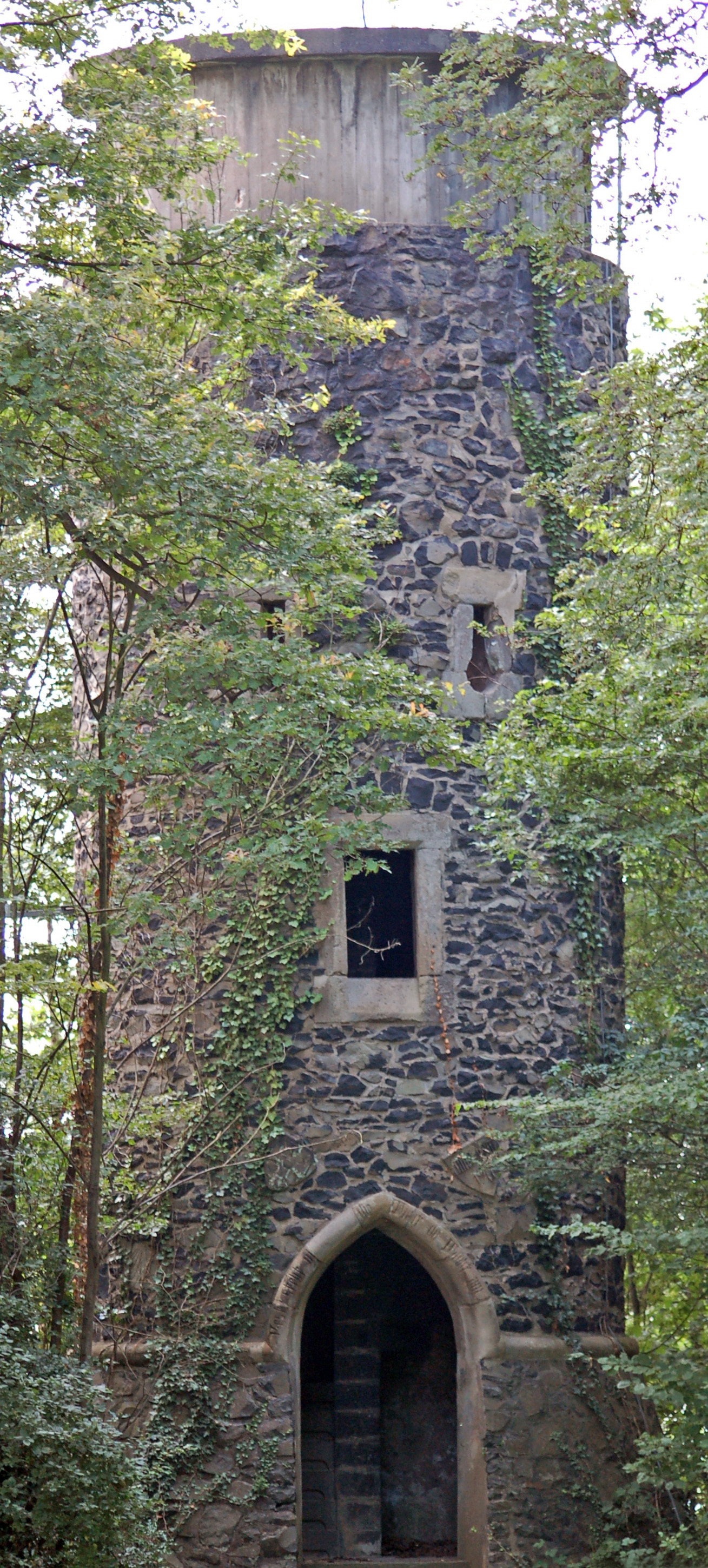 Der Aussichtsturm am Haus Heisterberg